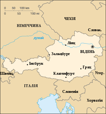 Austria mapa UK.png: Мапа Австрії.